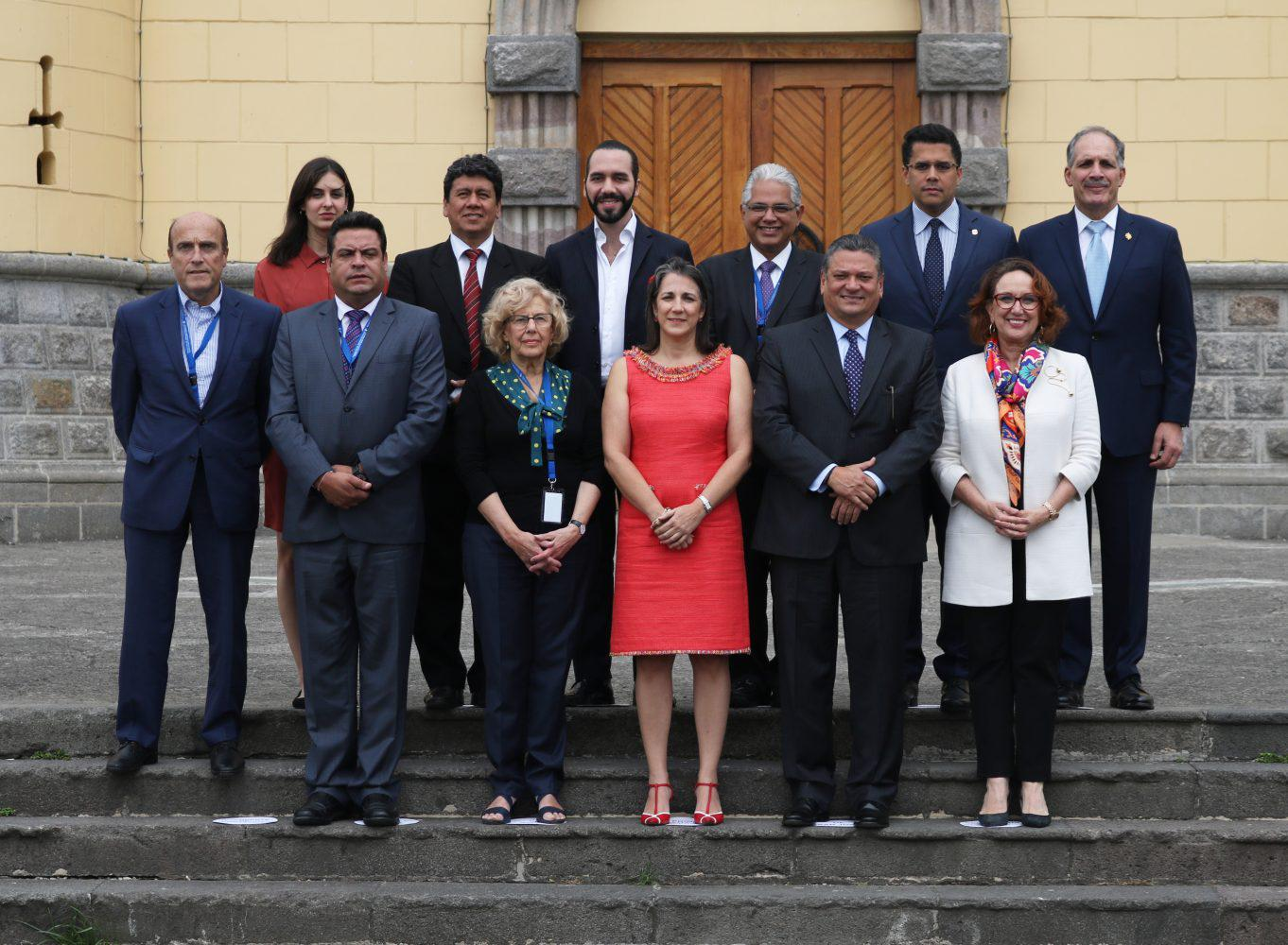 La alcaldesa de Madrid, Manuela Carmena, participó ayer jueves, 19 de abril, en la inauguración de la XVIII Asamblea General de la Unión de Ciudades Capitales Iberoamericanas (UCCI), organización que copreside. La cita, que tiene lugar en San José de Costa Rica, congrega durante dos días a 10 alcaldes y alcaldesas de Iberoamérica y a 23 ciudades de la región y en ella se definirá la estrategia de cooperación que seguirán la UCCI y sus 29 miembros en los dos próximos años para implementar en el ámbito local los Objetivos de Desarrollo Sostenible (ODS).